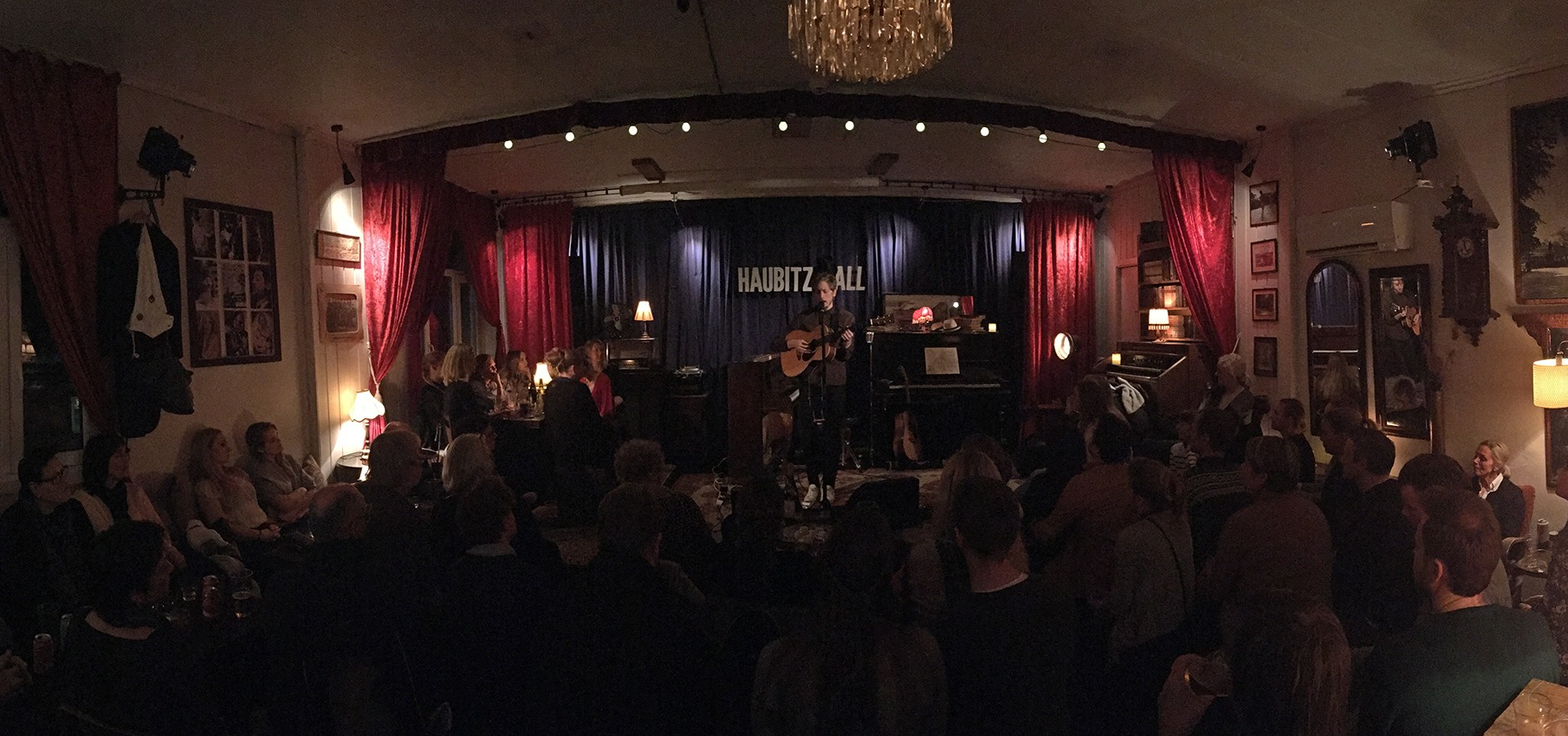 Jonas Alaska i Haubitz Hall Salongen